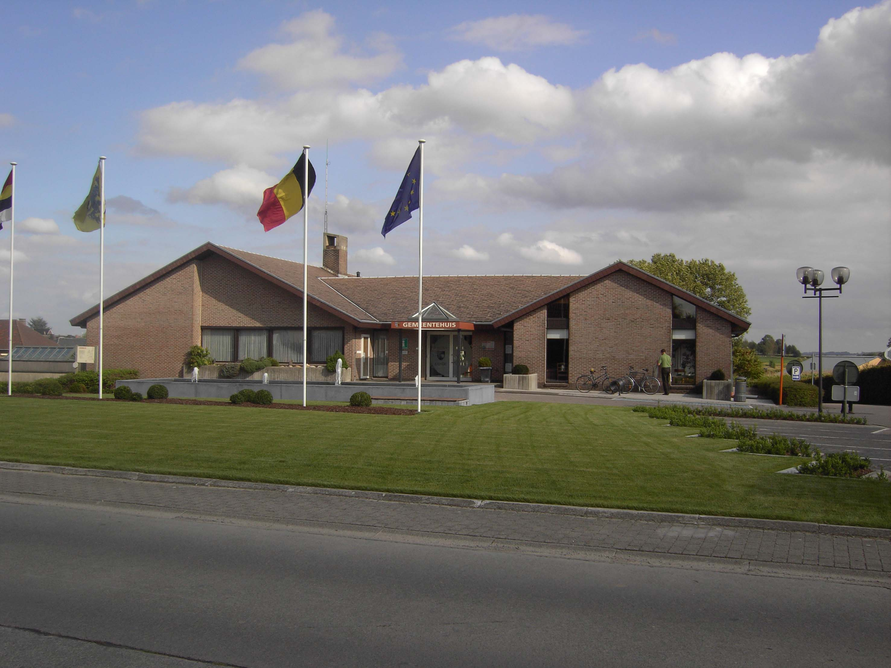 Gemeentehuis van Lierde - Oost-Vlaanderen - België